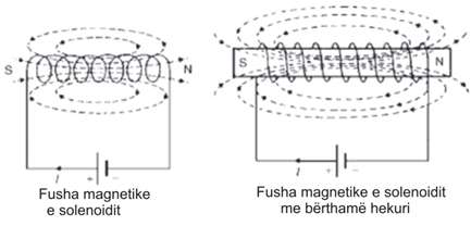 Elektromagnetizmi